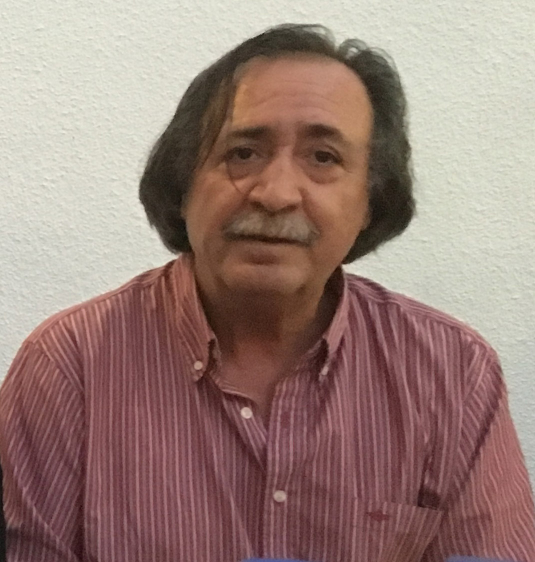 وارطان ساهاکیان. داوری جشن سینمای ایران ۱۰ شهریور ۱۳۹۵ خانه سینمای ایران